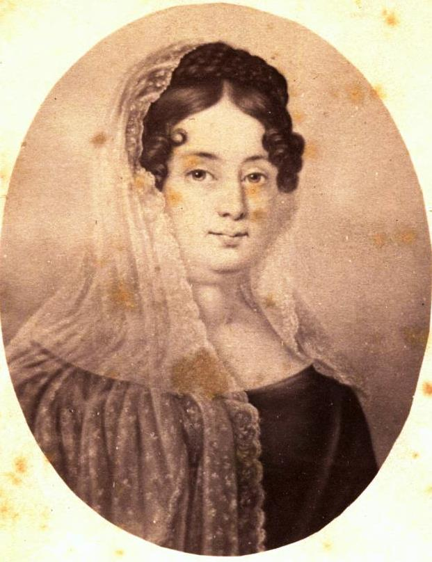 [Javiera Carrera Verdugo. Fotografía Reproducción de pintura.]